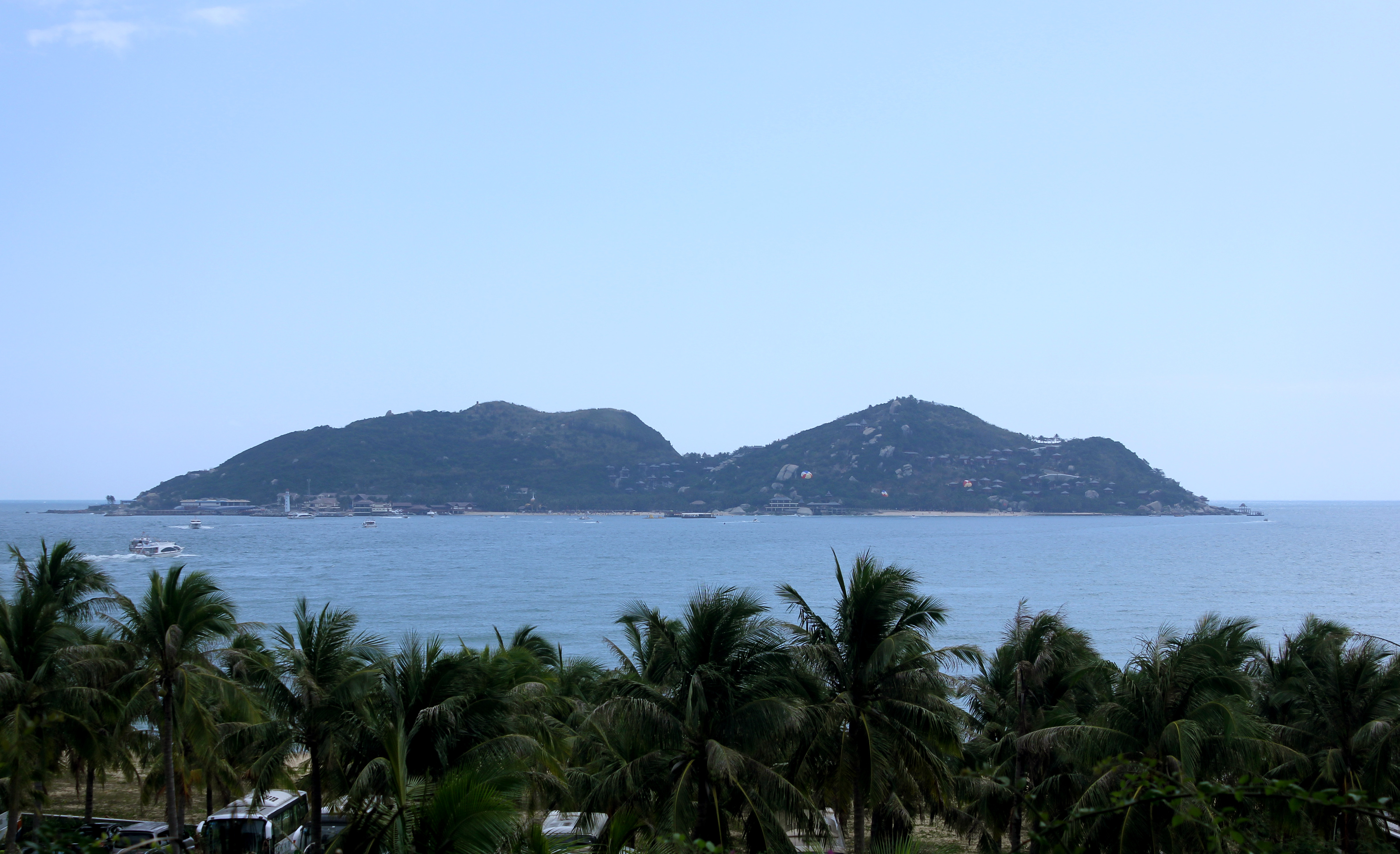 海南陵水分界洲